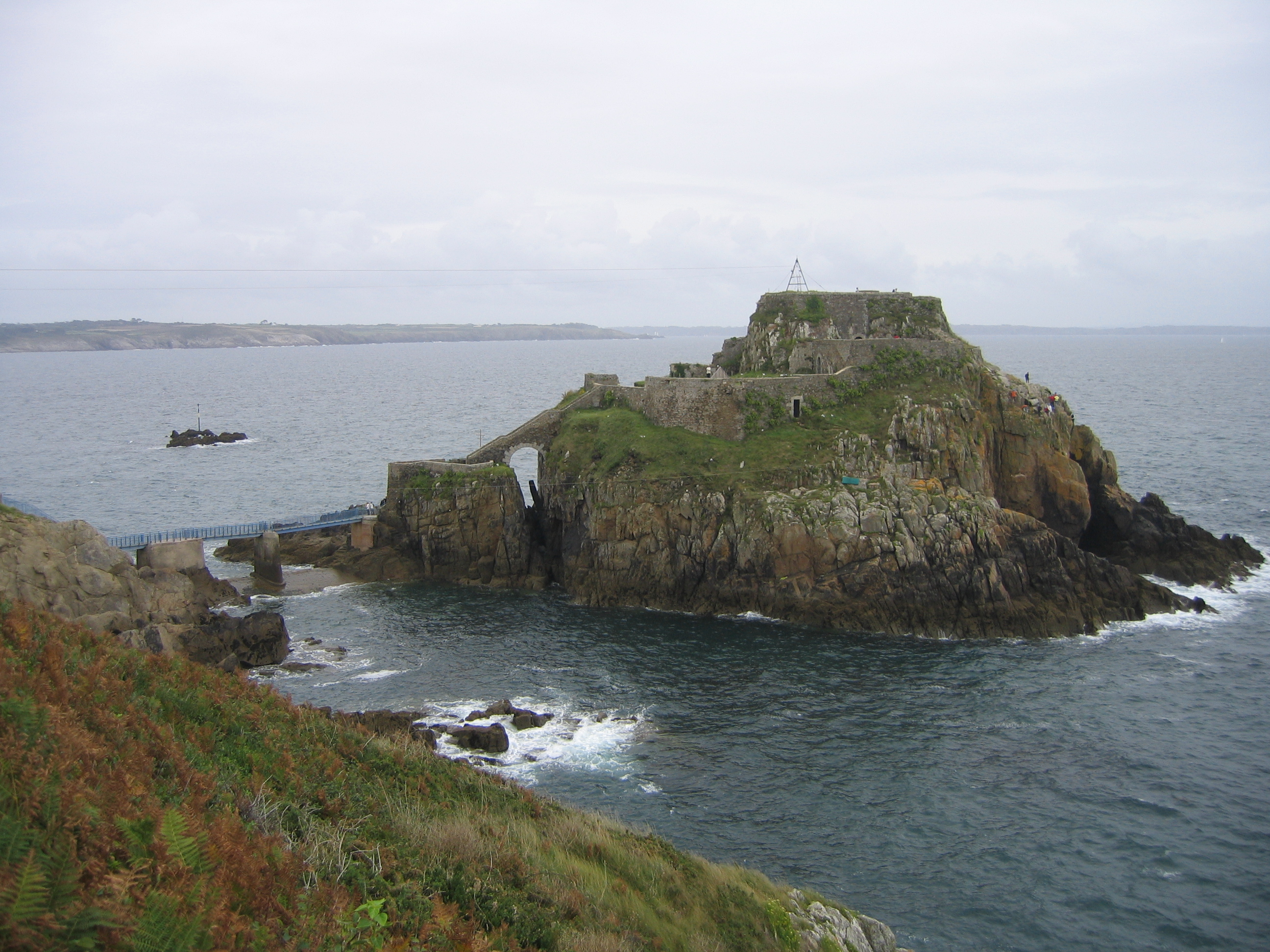 Fort de Bertheaume